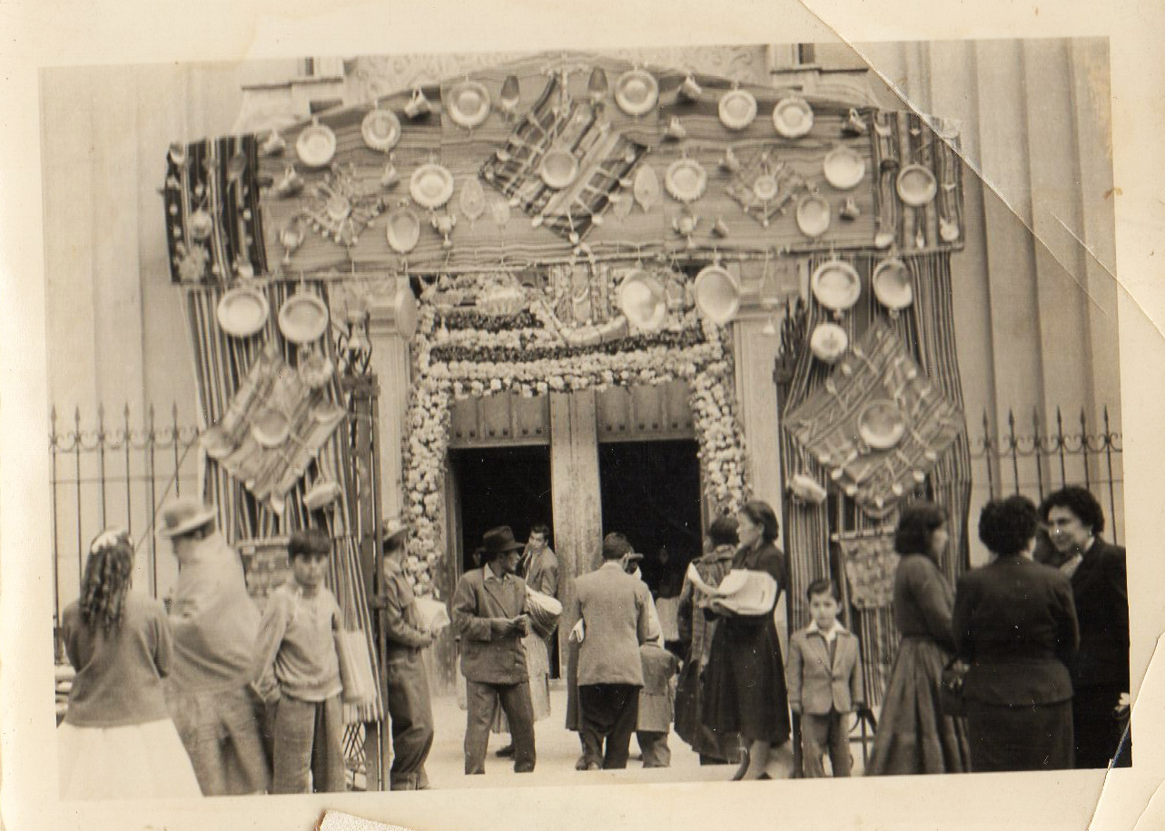 Iglesia de San Juan de Dios adormada con un arco de aguayos y platerìa en 1960.